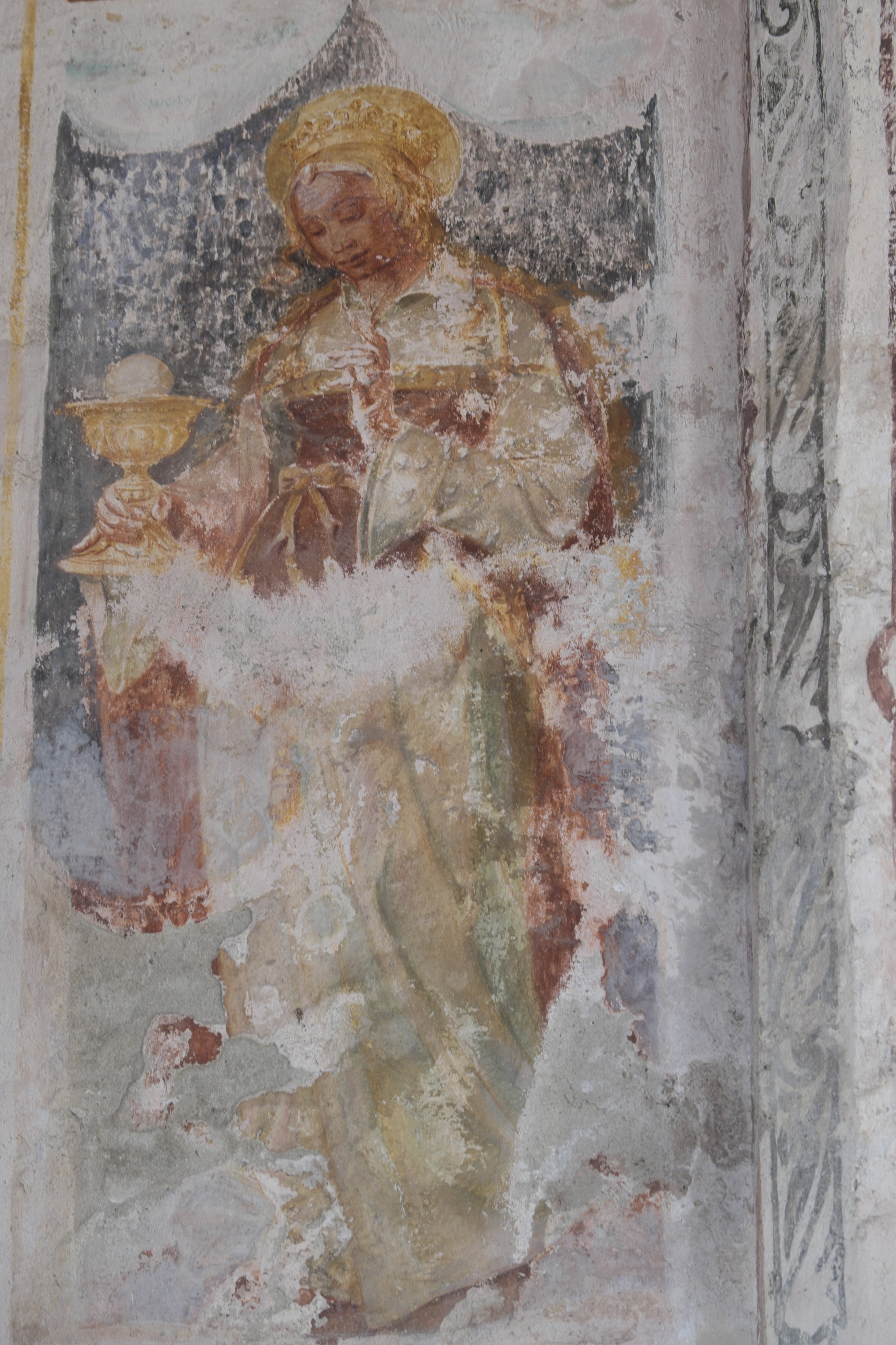 Katholische Friedhofskirche St. Salvator und Sebastian in Weilheim in Oberbayern im Landkreis Weilheim-Schongau (Bayern/Deutschland), Freskenzyklus zur Passion Christi von Elias Greuter (Greither) dem Älteren zwischen 1591 und 1615 geschaffen; Darstellung: Heilige Barbara